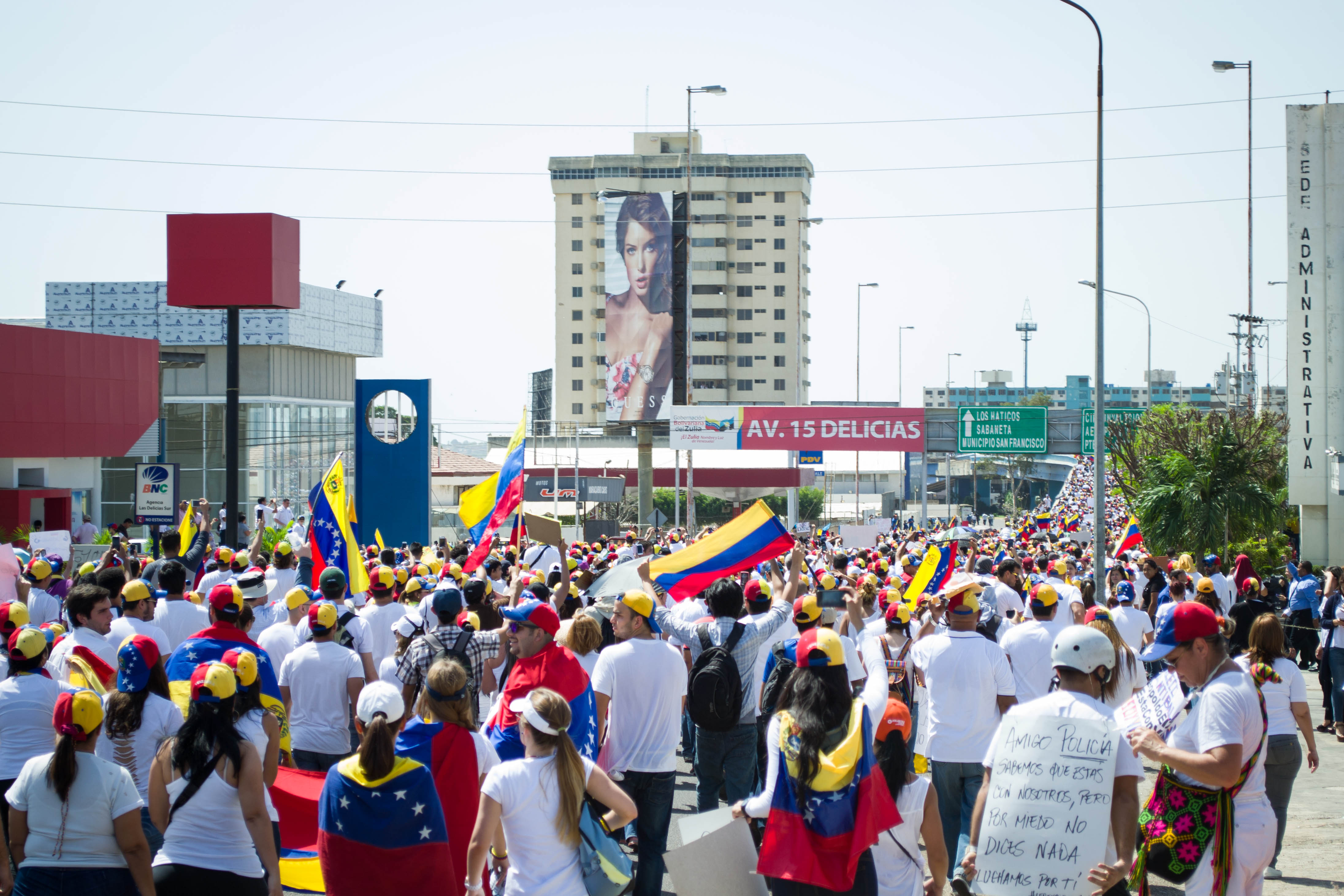 La gente de la oposición marchó pacíficamente hasta las inmediaciones del Palacio de Justicia de la ciudad de Maracaibo.